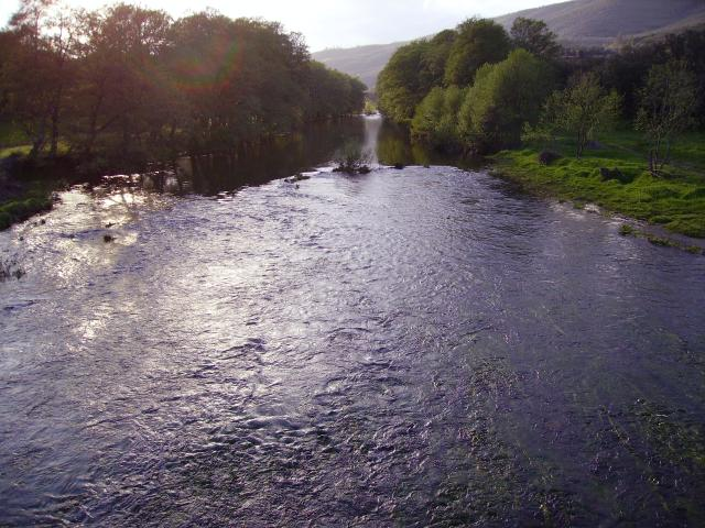 Río de Los Ángeles a su paso por Azabal.